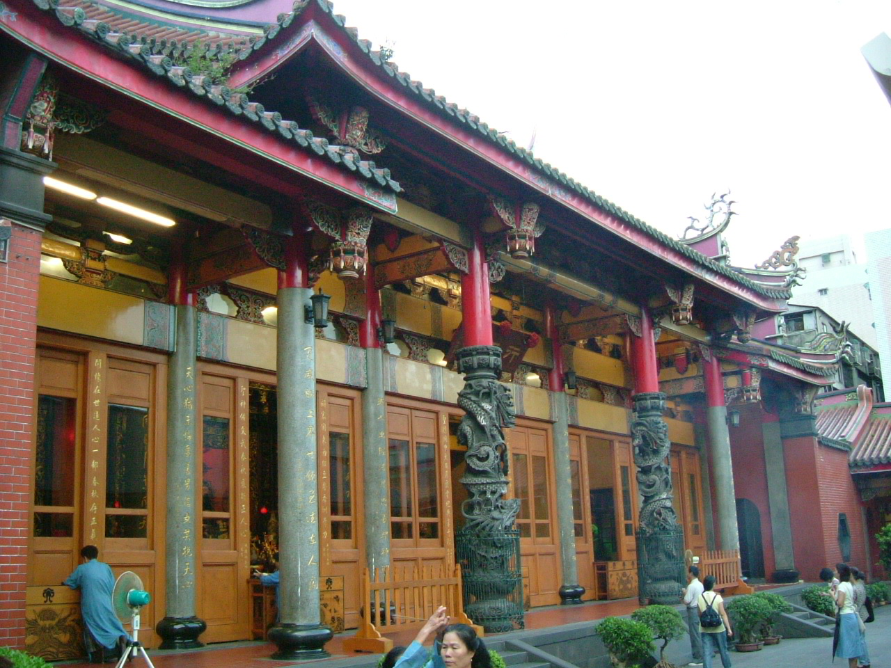 臺北市行天宮正殿。